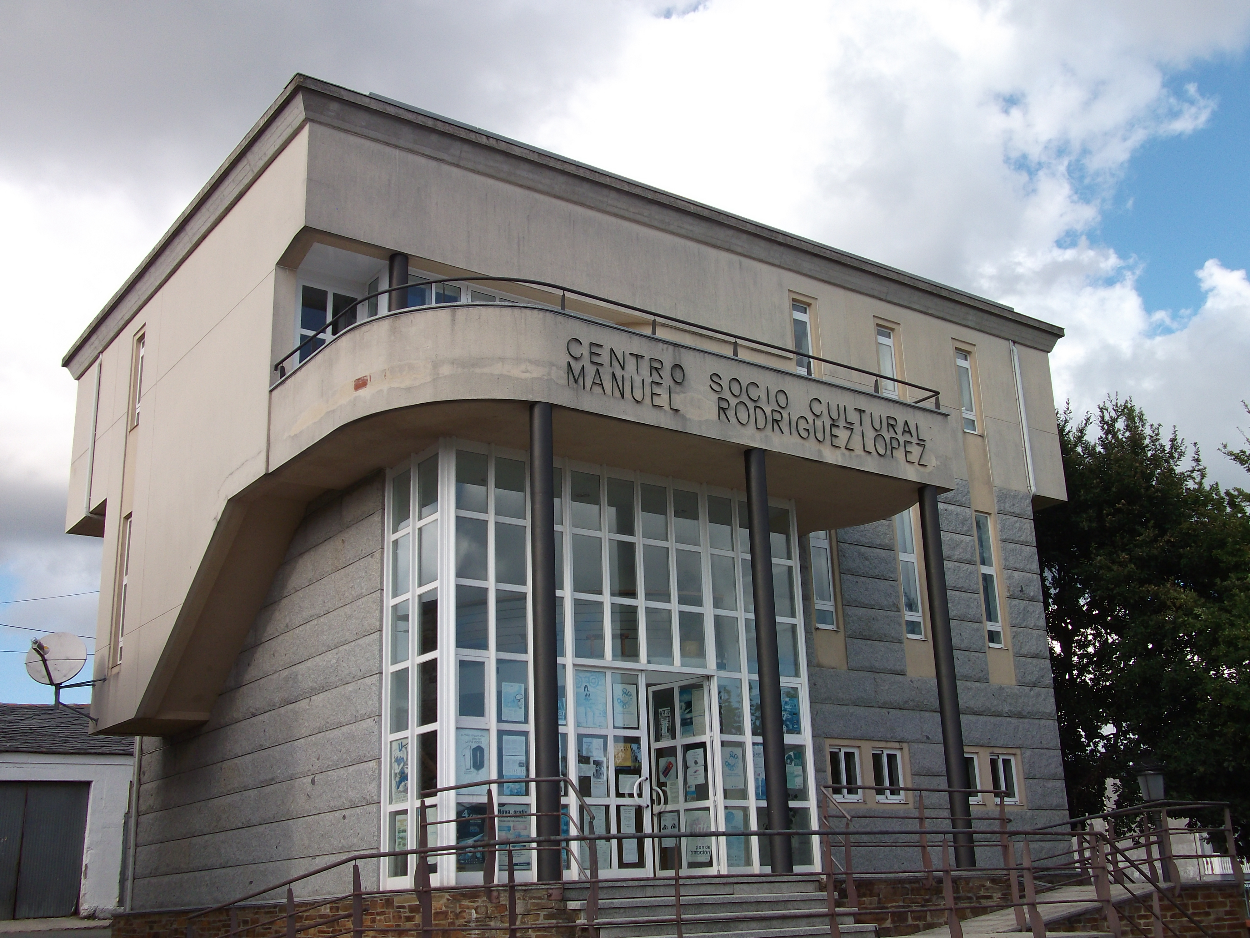 Centro Socio-cultural Manuel Rodriguez Lopez (Paradela,Lugo )